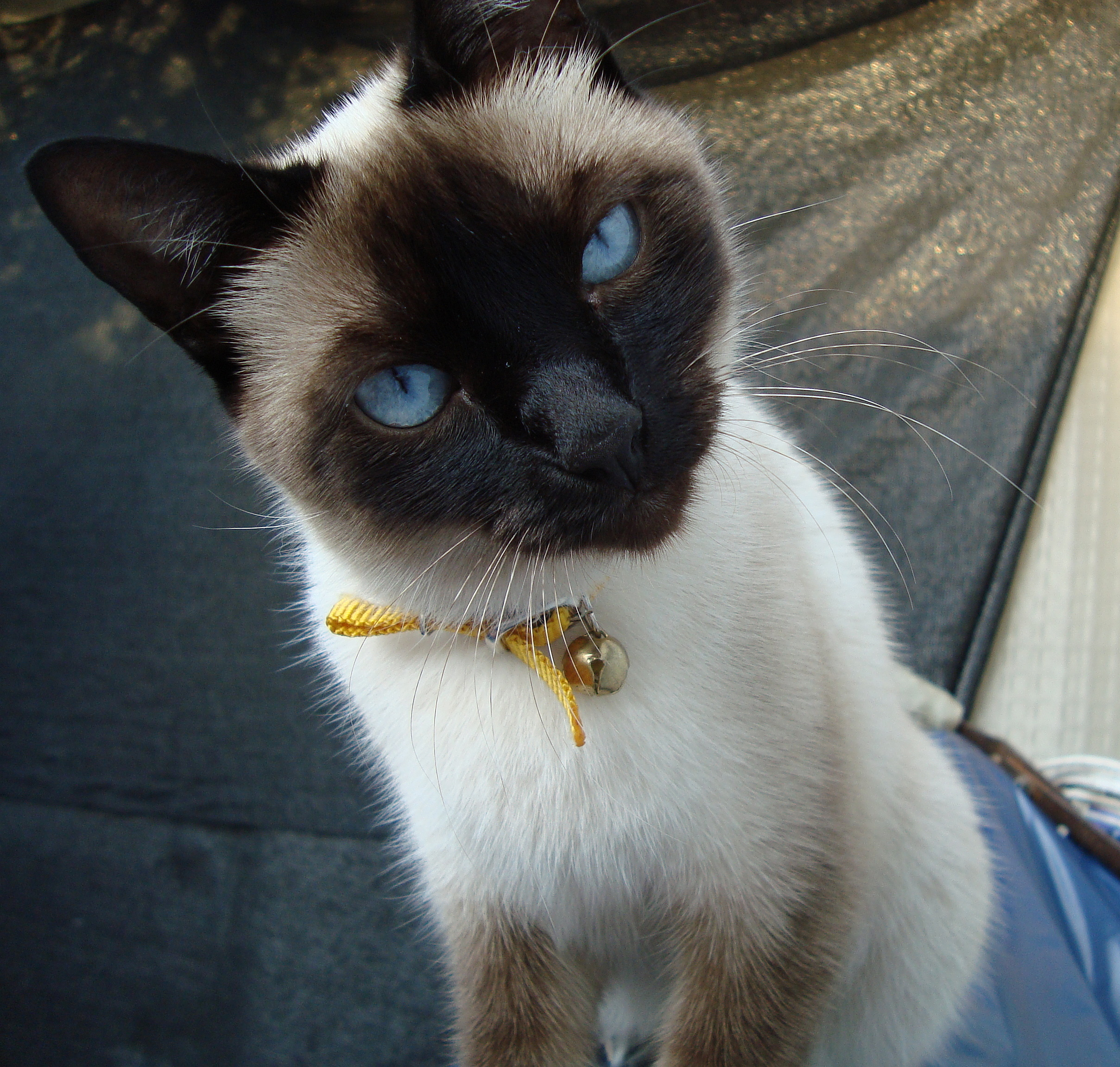 Gato raza siames